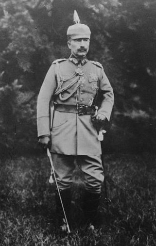 Wilhelm II